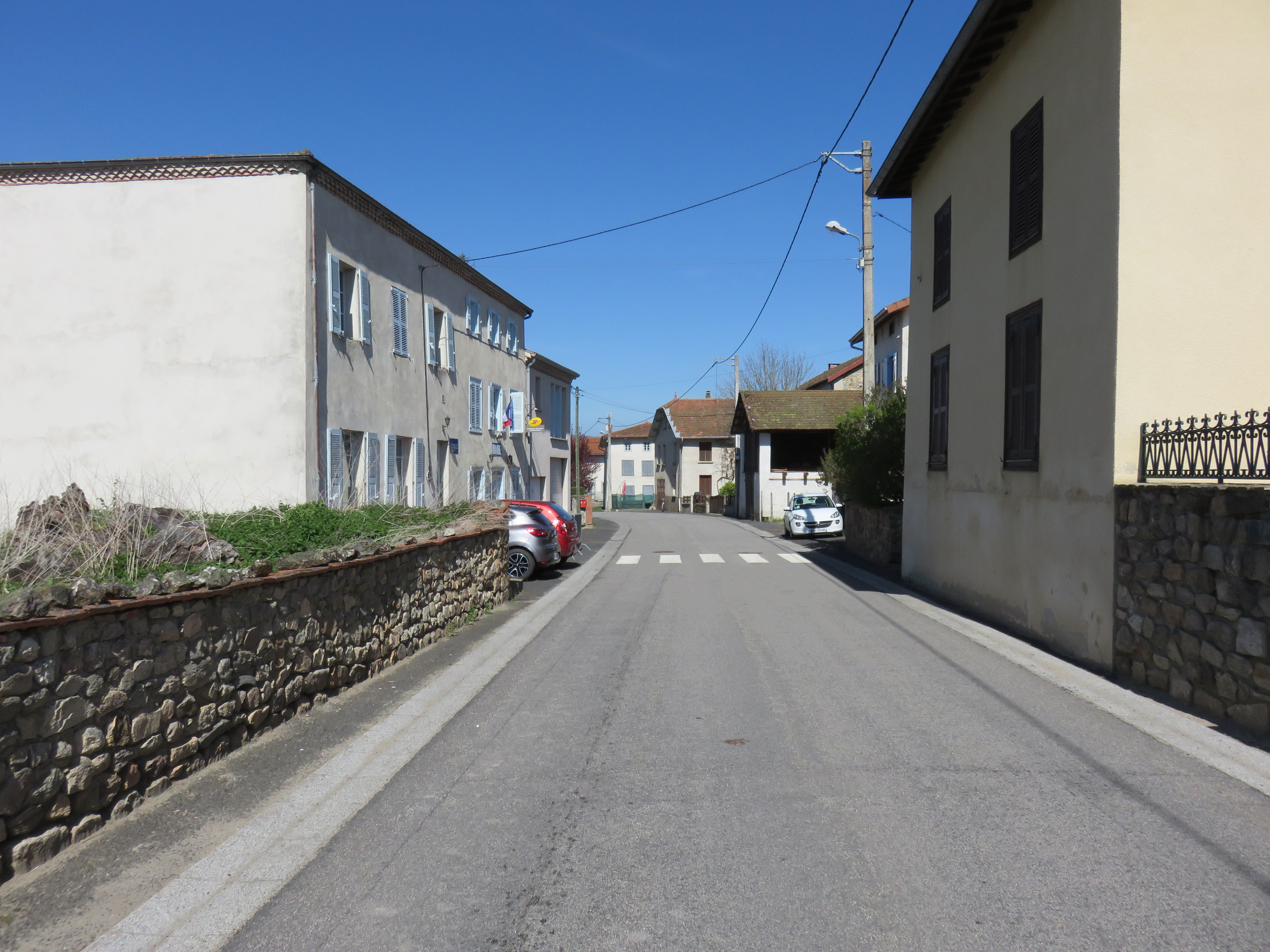 Route départementale 38 traversant le village de Chaumont-le-Bourg (Puy-de-Dôme, France).